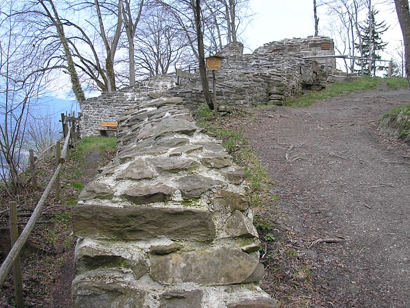 Burg Hopfen (Allgäu). Ringmauer, Kapelle und Wohnturm